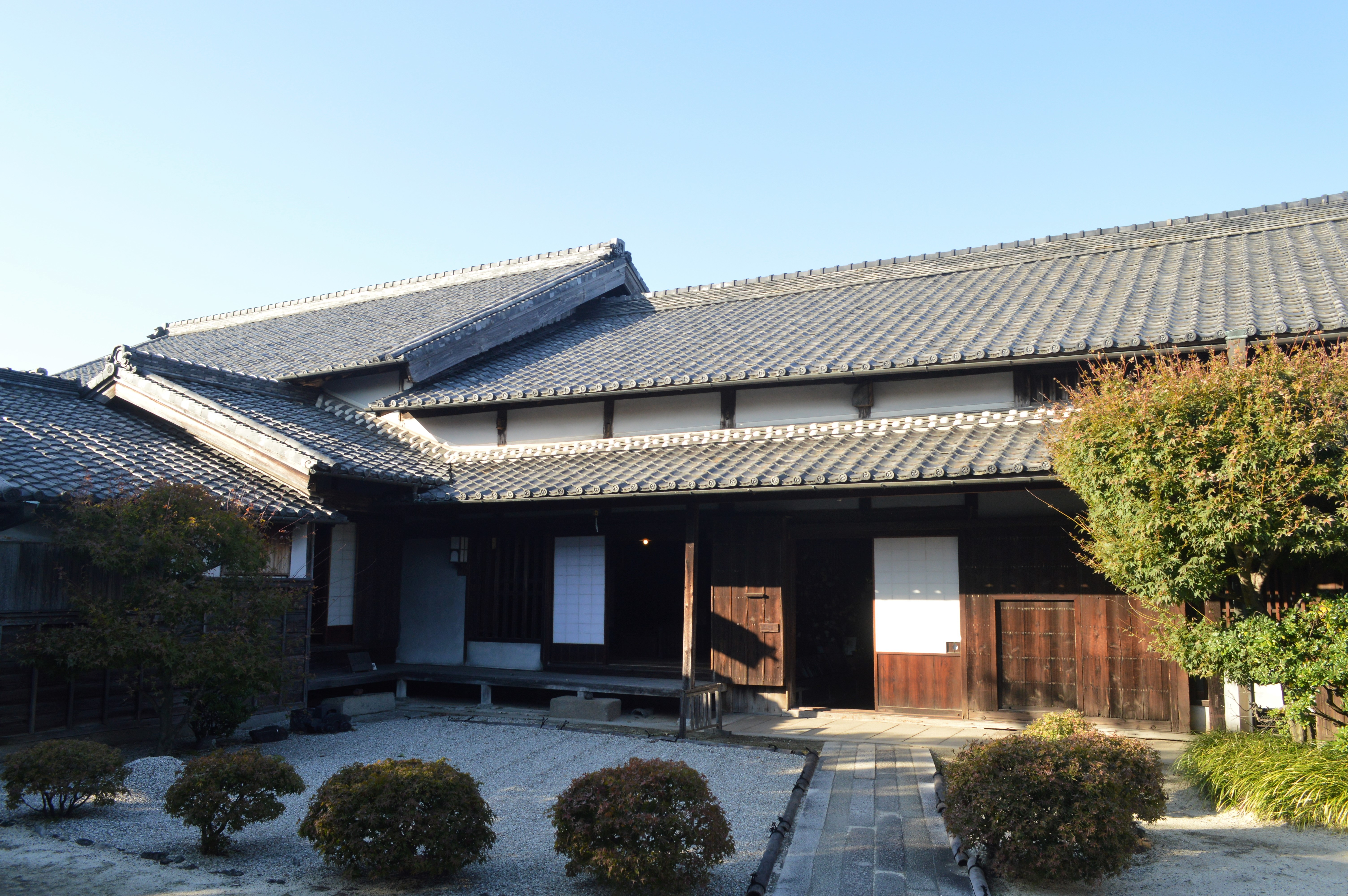 愛知県西尾市の旧糟屋邸。